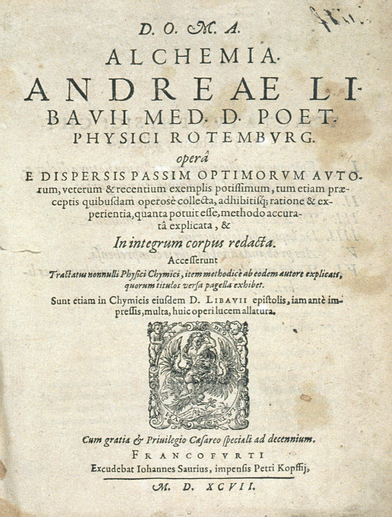 ALCHEMIA. ANDREAE LIBAVII